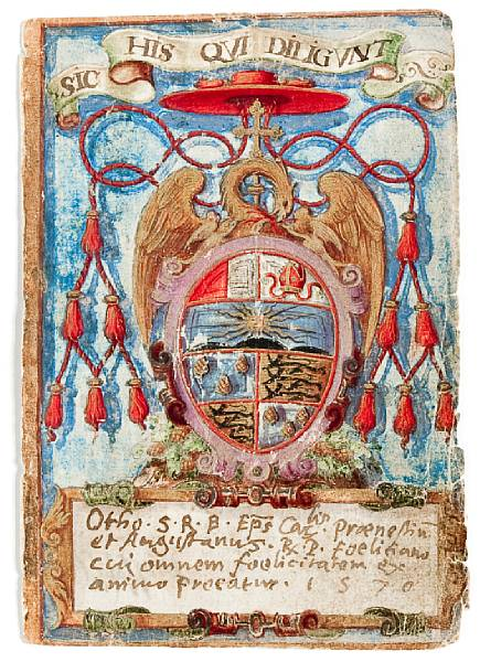 Wappen des Augsburger Bischofs Otto von Waldburg (aus dem Stammbuch des Feliciano Ninguarda, Bischof von Scala u. a., apostolischer Nuntius in Oberdeutschland); ca. 12 x 8 cm